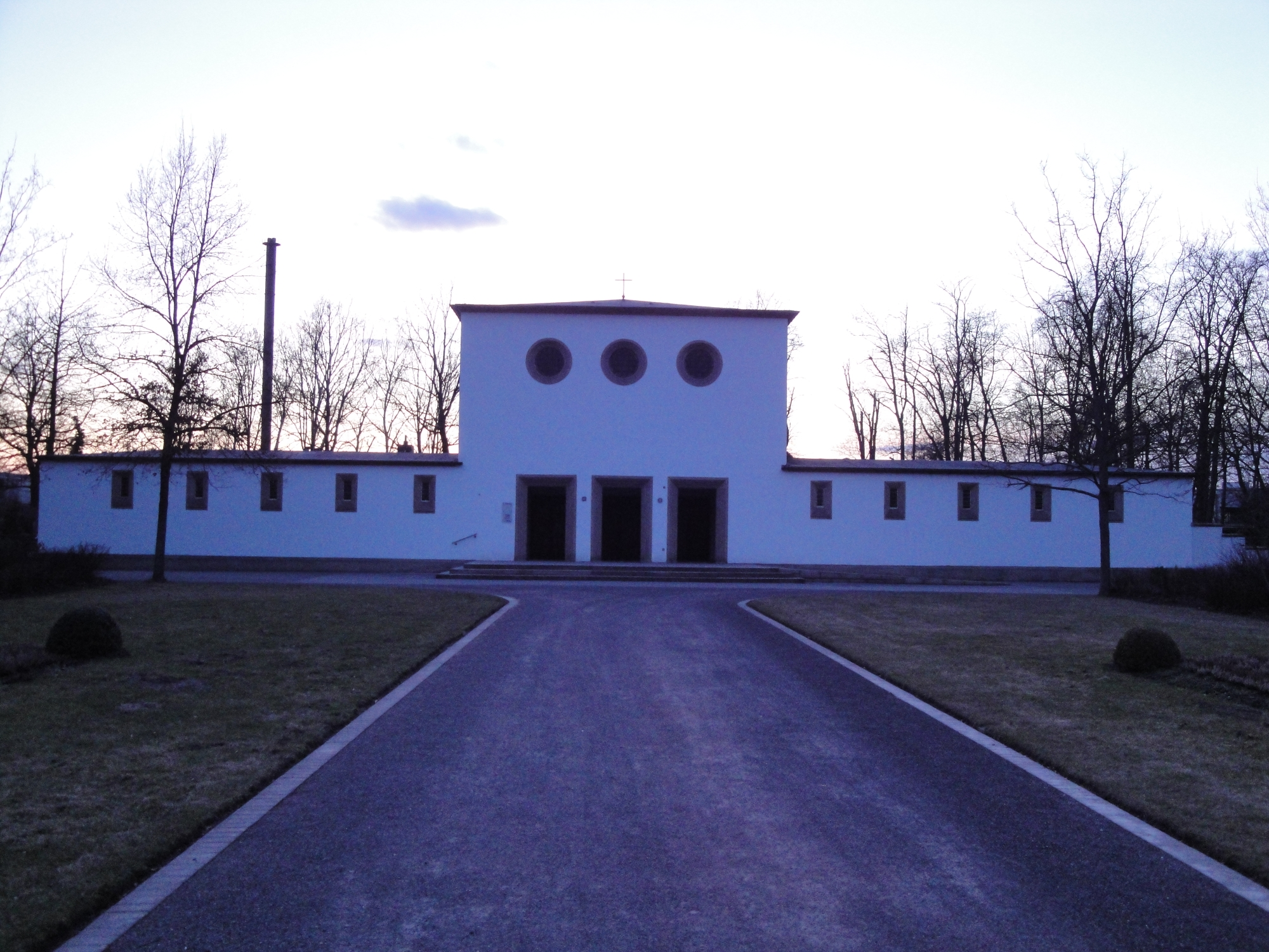 Kapelle des Neuen Friedhofs in Speyer